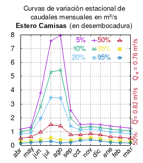 Curva de variación estacional del estero Camisas en desembocadura. # Dirección General de Aguas # Diagnóstico y clasificación de los cursos y cuerpos de agua según objetivos de calidad. Cuenca del río Choapa. # Santiago de Chile # Ministerio de Obras Públicas (Chile) # 2004 # url: # urlarchivo: # Tabla 4.6: Estero Camisas en desembocadura pág.47 mes 5% 10% 20% 50% 85% 95% Abr 1.166 0.989 0.798 0.503 0.254 0.158 May 1.324 1.136 0.932 0.611 0.331 0.217 Jun 3.799 2.803 1.939 0.959 0.403 0.242 Jul 7.570 5.315 3.463 1.527 0.557 0.308 Ago 7.959 5.443 3.423 1.384 0.414 0.178 Sep 2.547 1.947 1.407 0.756 0.352 0.224 Oct 1.501 1.299 1.088 0.769 0.486 0.357 Nov 1.555 1.371 1.172 0.853 0.549 0.408 Dic 1.513 1.307 1.092 0.767 0.479 0.348 Ene 1.404 1.182 0.956 0.625 0.350 0.236 Feb 1.324 1.124 0.916 0.602 0.323 0.196 Mar 1.269 1.052 0.834 0.521 0.270 0.169 This plot was created with Gnuplot.